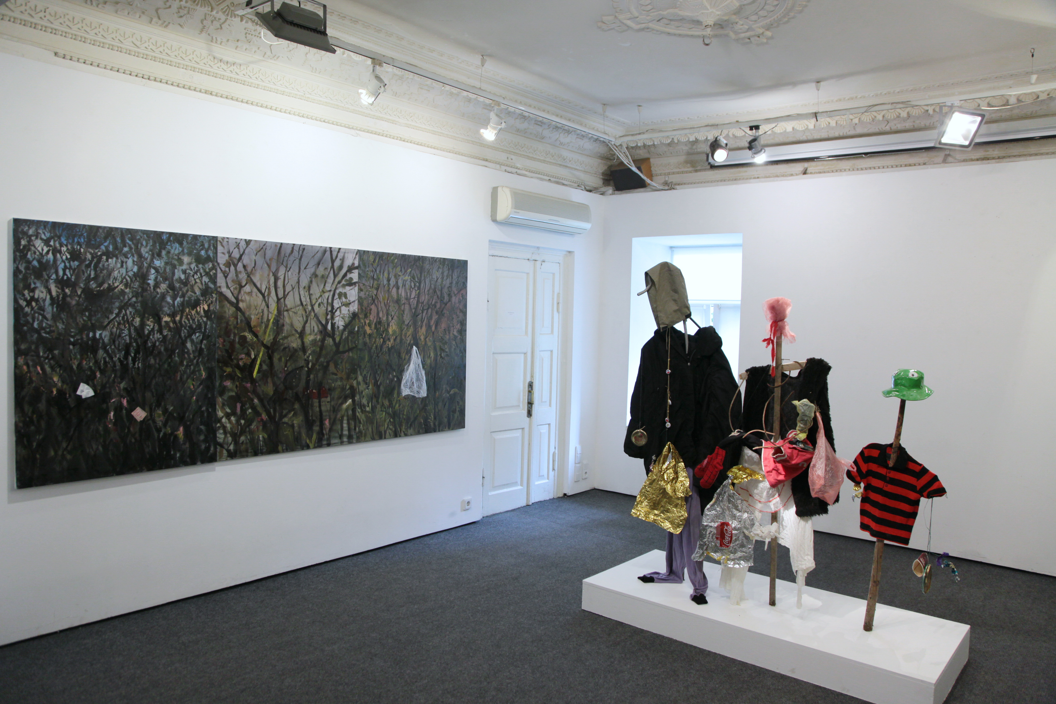 Карась Галерея. Експозиція виставки "Без Назви" Євген Самборський. 2017 рік.